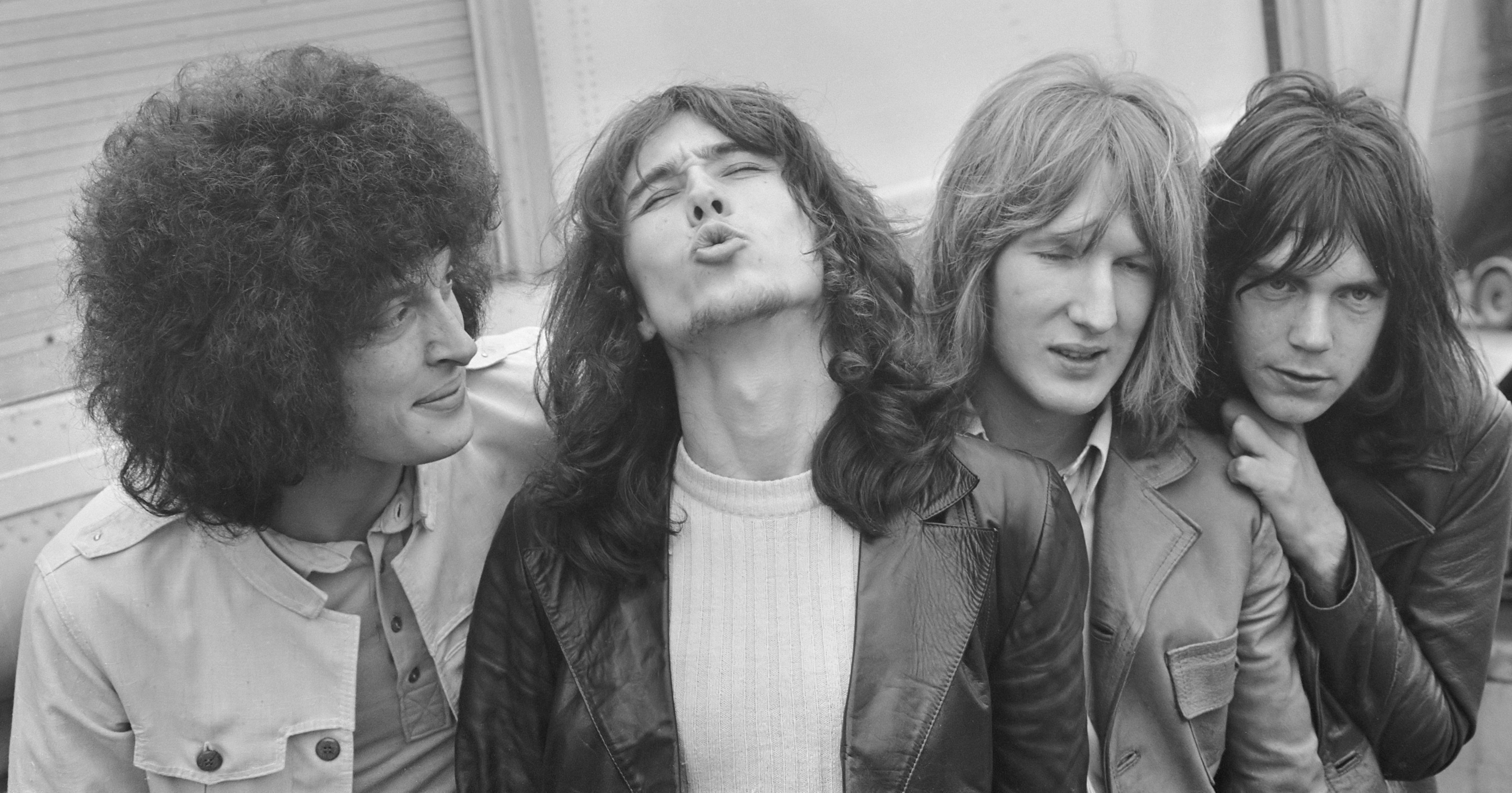 Nederlandse popgroep no. 1 , de Golden Earrings , mag niet naar de Verenigde Staten. Golden Earrings op platform van Schiphol Vlnr. Barry Hay, George Kooymans, Jaap Eggermont en Rinus Gerritsen. 24 april 1969